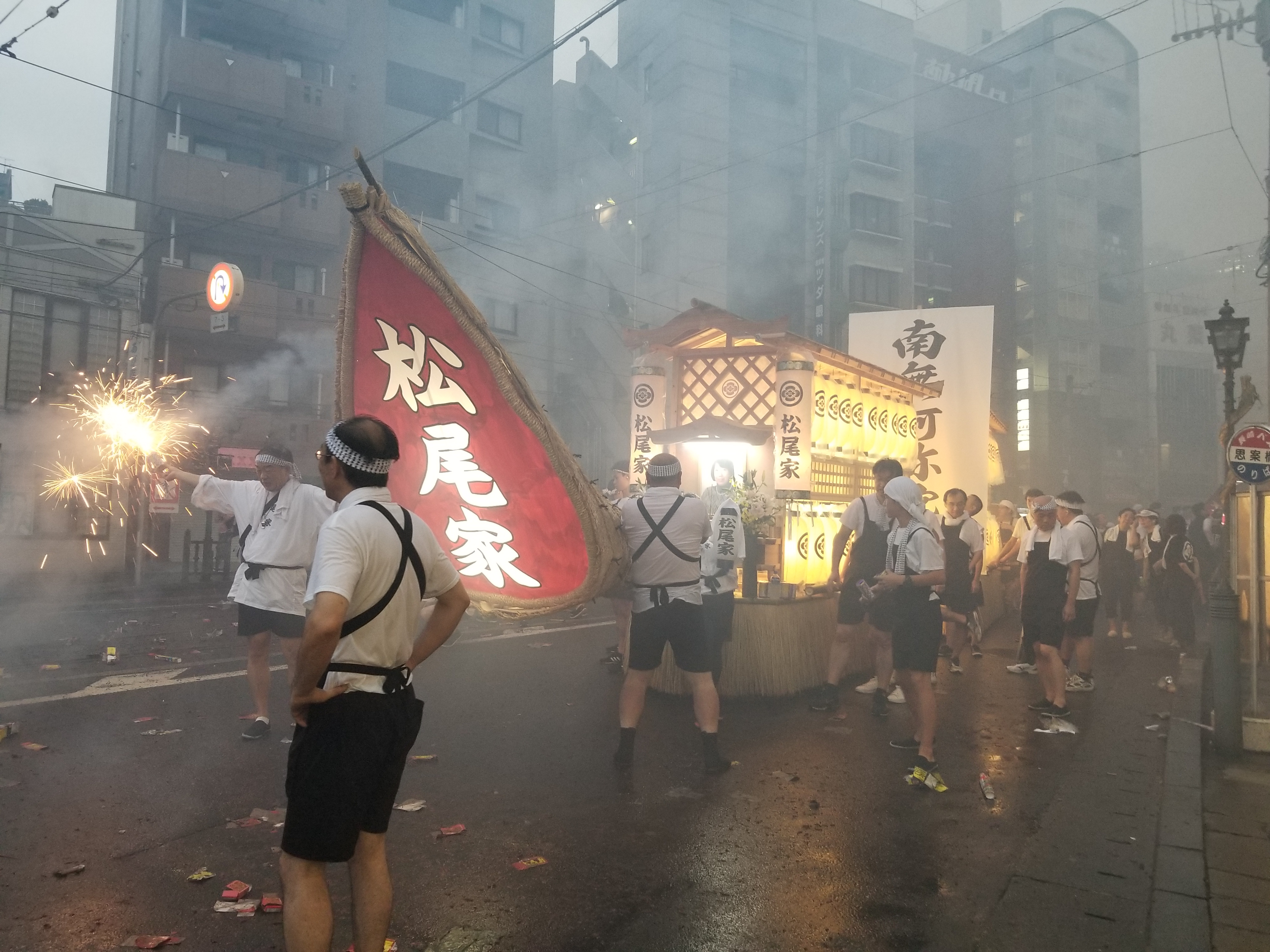 精霊流し（長崎県長崎市2017年8月15日）